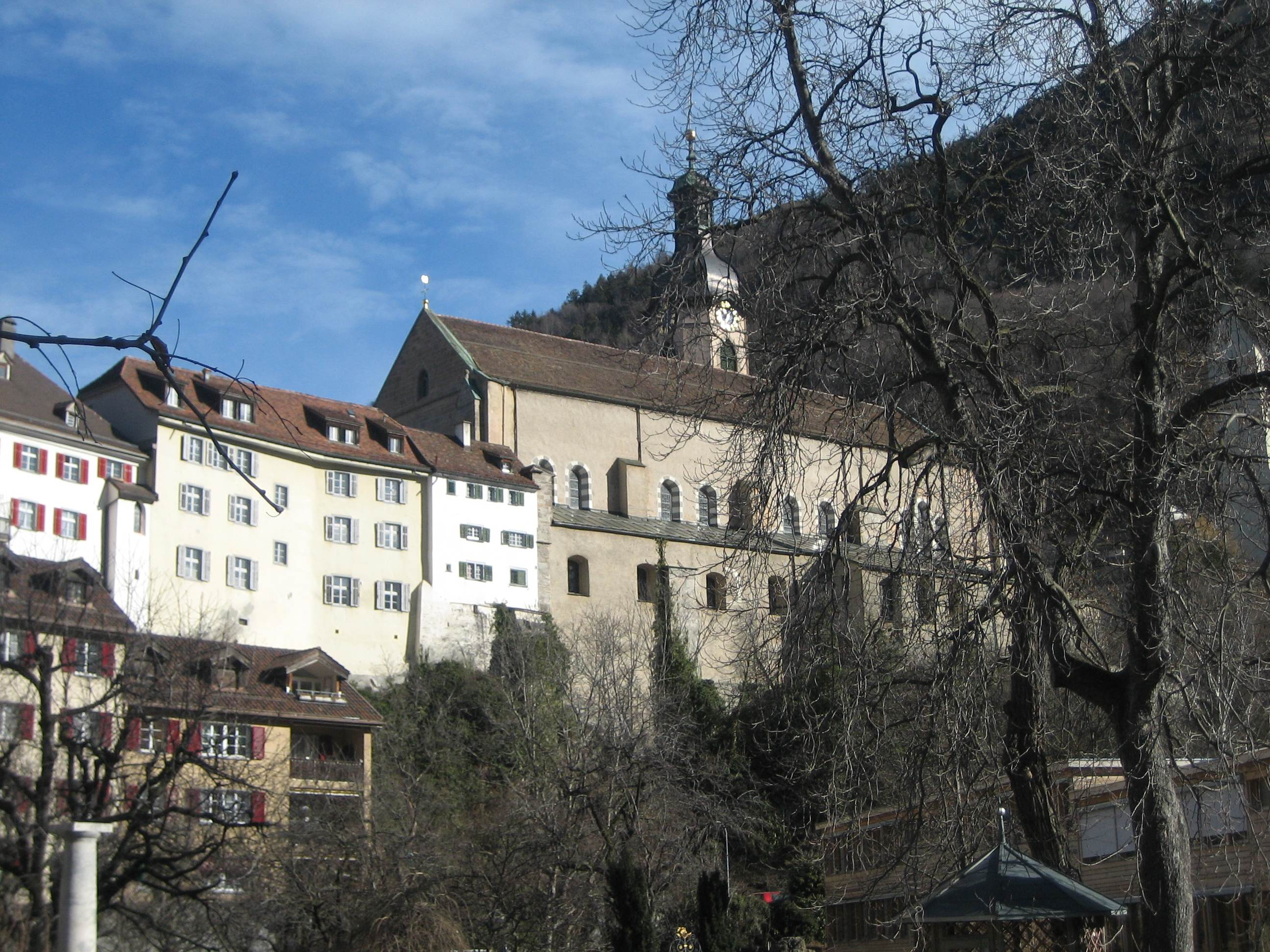 Kathedrale, Ansicht von Westen